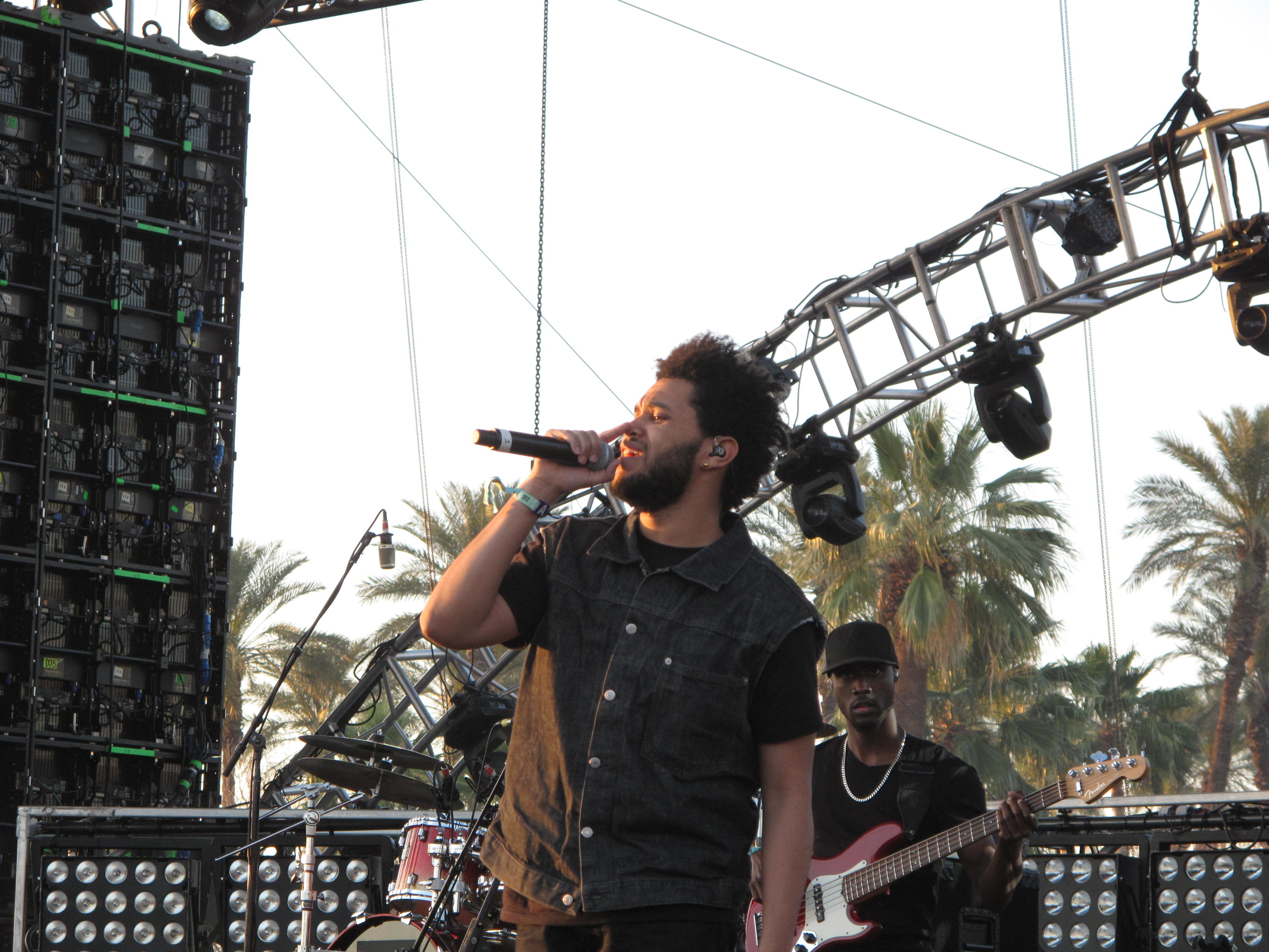 Weeknd